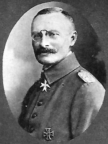 Major von Bila, Träger des Pour le Mérites